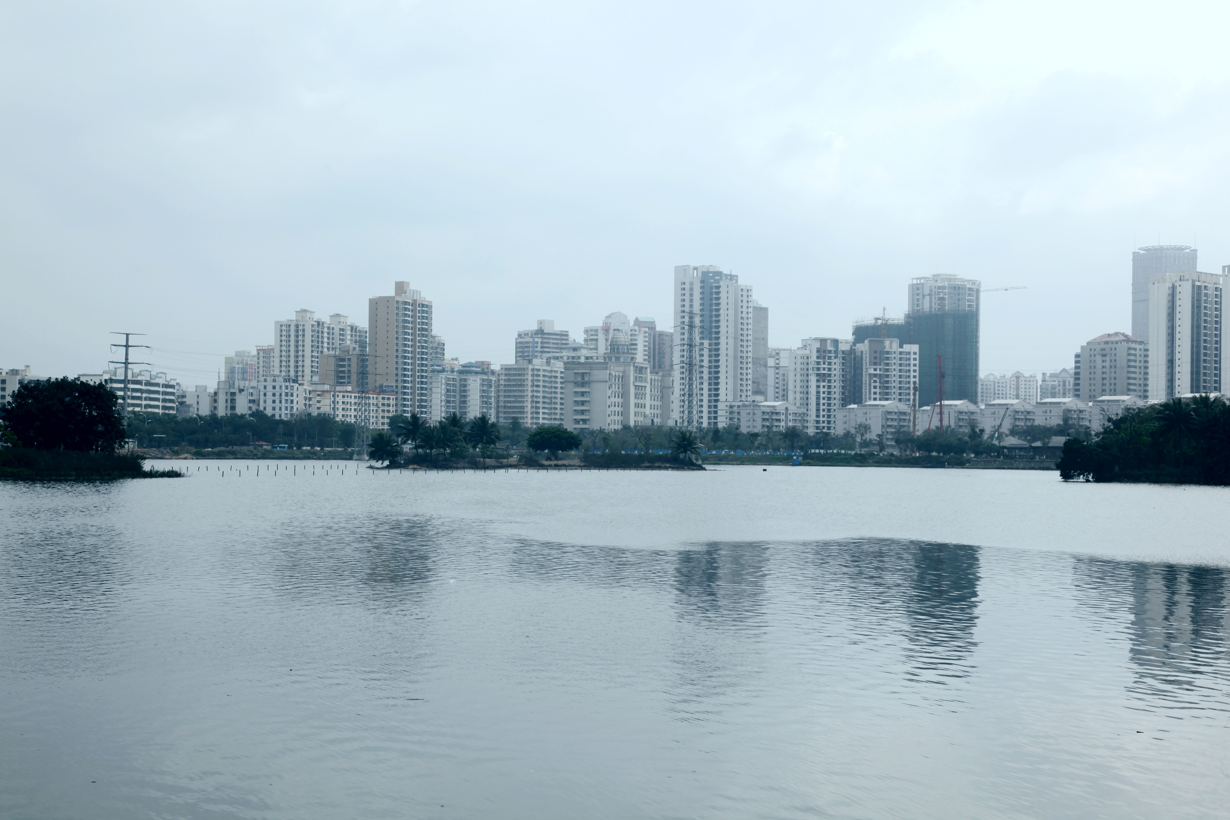 海南国际旅游岛——红城湖景观（西南向）